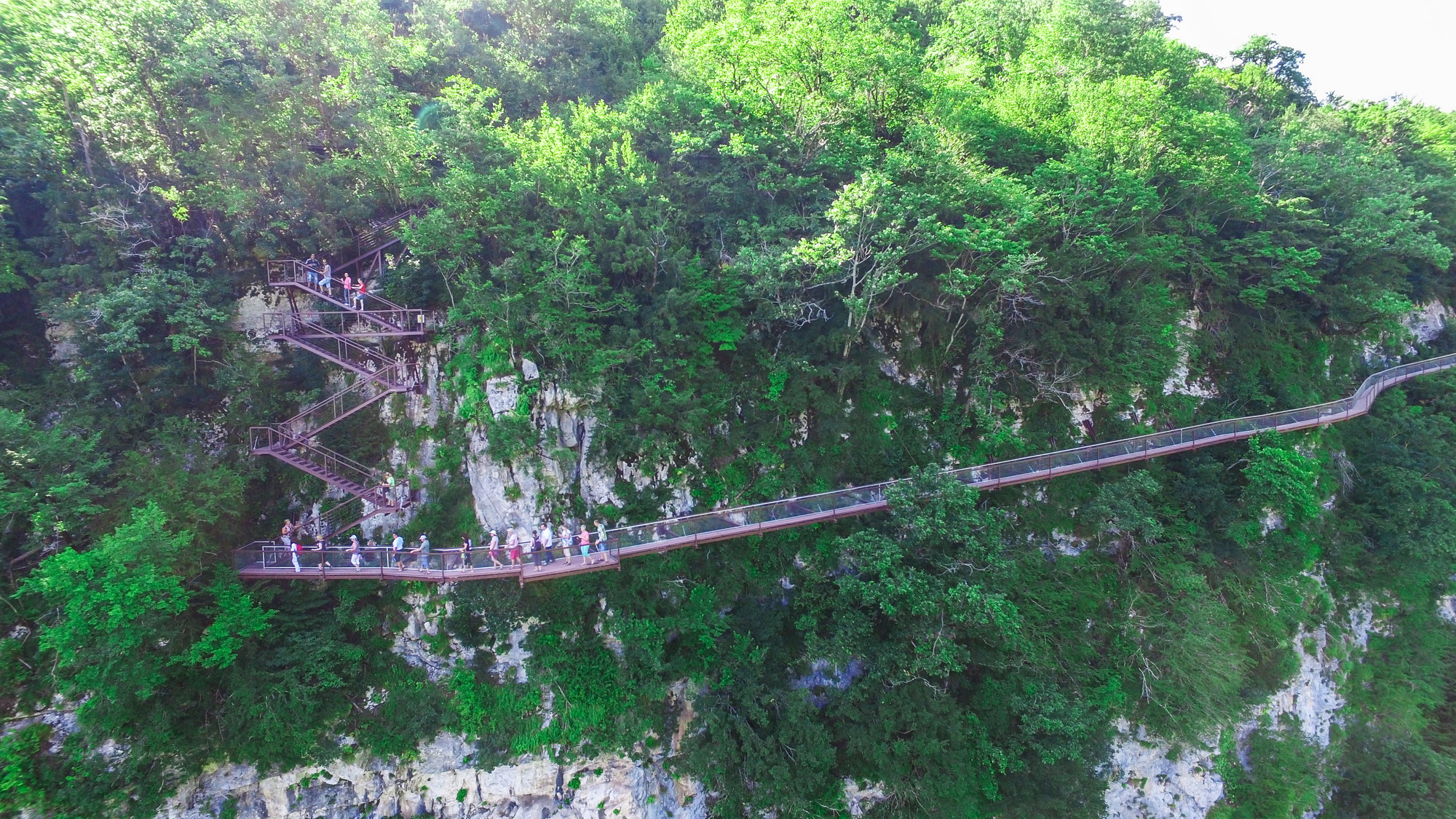 ოკაცეს კანიონის ბუნების ძეგლი ღირშესანიშნაობა:ბუნების ძეგლი წარმოადგენს რთულ, პალეოგრაფიულ, გეოლოგიურ და განსაკუთრებული გეომორფოლოგიური აგებულებით გამორჩეულ კომპლექს, რომლის შემადგენლობაში შედის ნეოტექტონიკური სტრუქტურები, ტბიური ნალექები, თვალწარმტაცი კლიუზ-კანიონი. მდ. საწისქვილოს მიერ ზედაცარცულ კირქვებში გამომუშავებული ოკაცეს კანიონის სიღრმე 35-50 მ-ია, სიგანე საშუალოდ 4 მ, ზოგიერთ ადგილას კანიონის კედლები თითქმის უერთდება ერთმანეთს და ბუნებრივ ქვახიდებს წარმოქმნის, ერთ-ერთი მათგანია „ბოგა”, საიდანაც კანიონის ფსკერის დანახვაა შესაძლებელი. შუა მეოთხეულში მდ. საწისქვილოს ხეობა გადაიკეტა ტექტონიკური ნასხლეტით და მასში გაჩნდა ტბა, რომელშიც თიხა-ქვიშა ილექებოდა. ტბიური ნალექების წყების სისქემ 27 მეტრს გადააჭარბა. მას შემდეგ რამდენიმე ათეულმა ათასმა წელმა განვლო. წყალმა იპოვნა გასასვლელი კირქვის ნაპრალებში, გააფართოვა ისინი და დაცალა ტბა. დაიწყო ტბიური ნალექების გადარეცხვა და კანიონის გამომუშავება. ამჟამად ტბიური ნალექები შემორჩენილია ცალკეულ ფრაგმენტებად. გორდის პლეისტოცენურ ტბიურ ნალექებში ნათლადაა გამოსახული სეზონური შრეებრიობა. შრეთა ყოველი წყვილი შეესაბამება ერთ წელს. ტბიური წყების პალინოლოგიური შესწავლით(ნამარხი მცენერეების მტვრისა და სპორების მიკროსკოპული კვლევით) გაირკვა, რომ წყების ქვედა ნაწილში დაცულია ფლორის არქაული, სადღეისოდ გამქრალი სახეობების ნაშთები (ჭაობის კვიპაროზი ანუ ტაქსოდიუმი, ენგელჰარდტია, კარია, ტსუგა, კედარი ანუ ცედრუსი და სხვ.). გორდის ტბიური წყების უფრო მაღლა მდებარე შრეებში ეს მცენარეები აღარ არის, რაც არეკლავს ოროგენეზის მიერ გამოწვეულ კლიმატის აცივებას. დღეისათვის კანიონი თავისებურ მიკროკლიმატს ქმნის, რაც განაპირობებს, მრავალი იშვიათი და გადაშენების პირას მყოფი მერქნიანი მცენარისთვის, საბინადრო გარემოს ჩამოყალიბებას. მდებარეობა: ხონის მუნიციპალიტეტი, სოფ. გორდის მიდამოები, 520 მეტრი ზღვის დონიდან. კოორდინატები: N42 27.079 E42 33.003